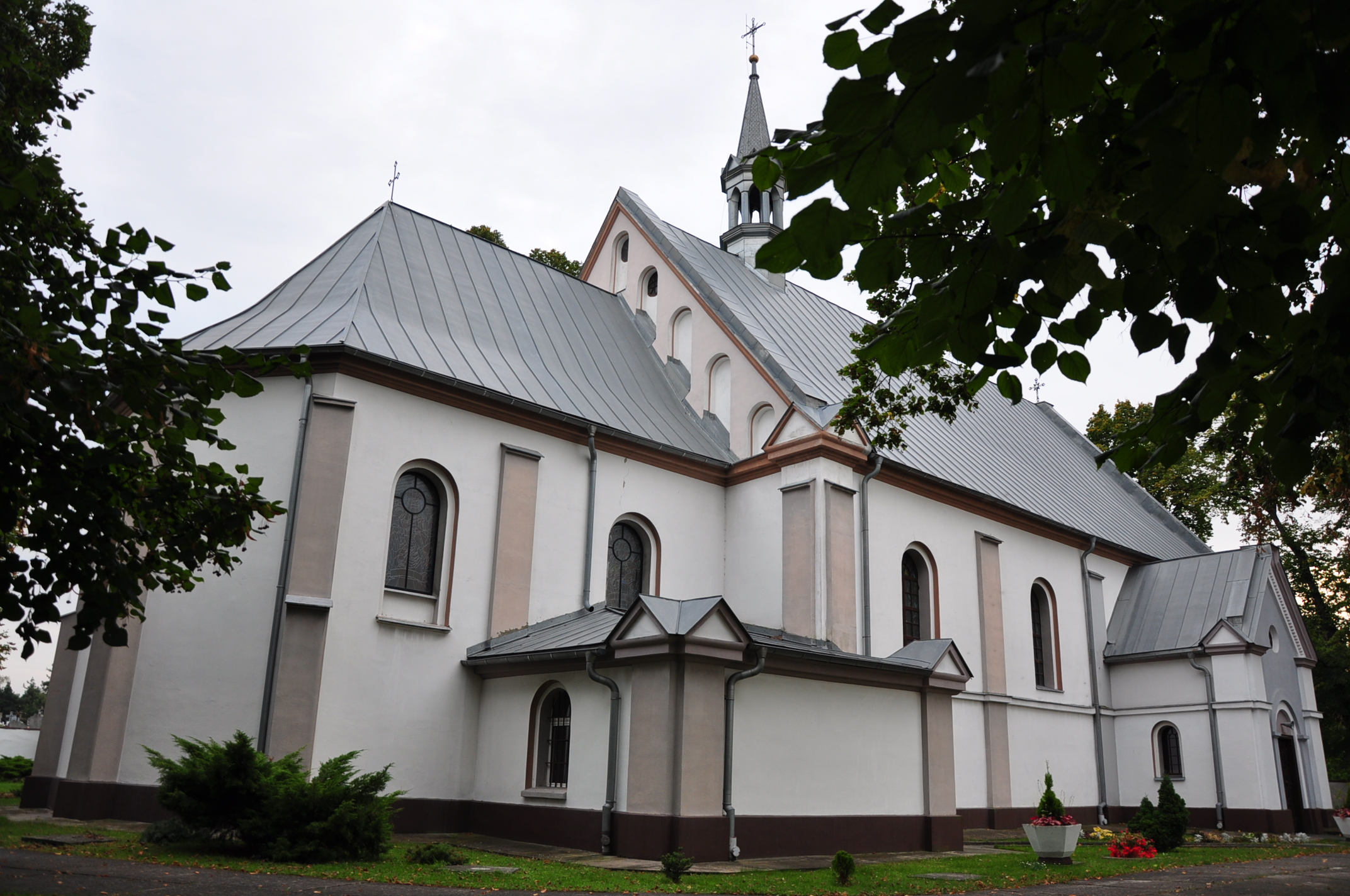 Chechło, kościół parafialny pw. Narodzenia Najświętszej Maryi Panny, 1807, 1895